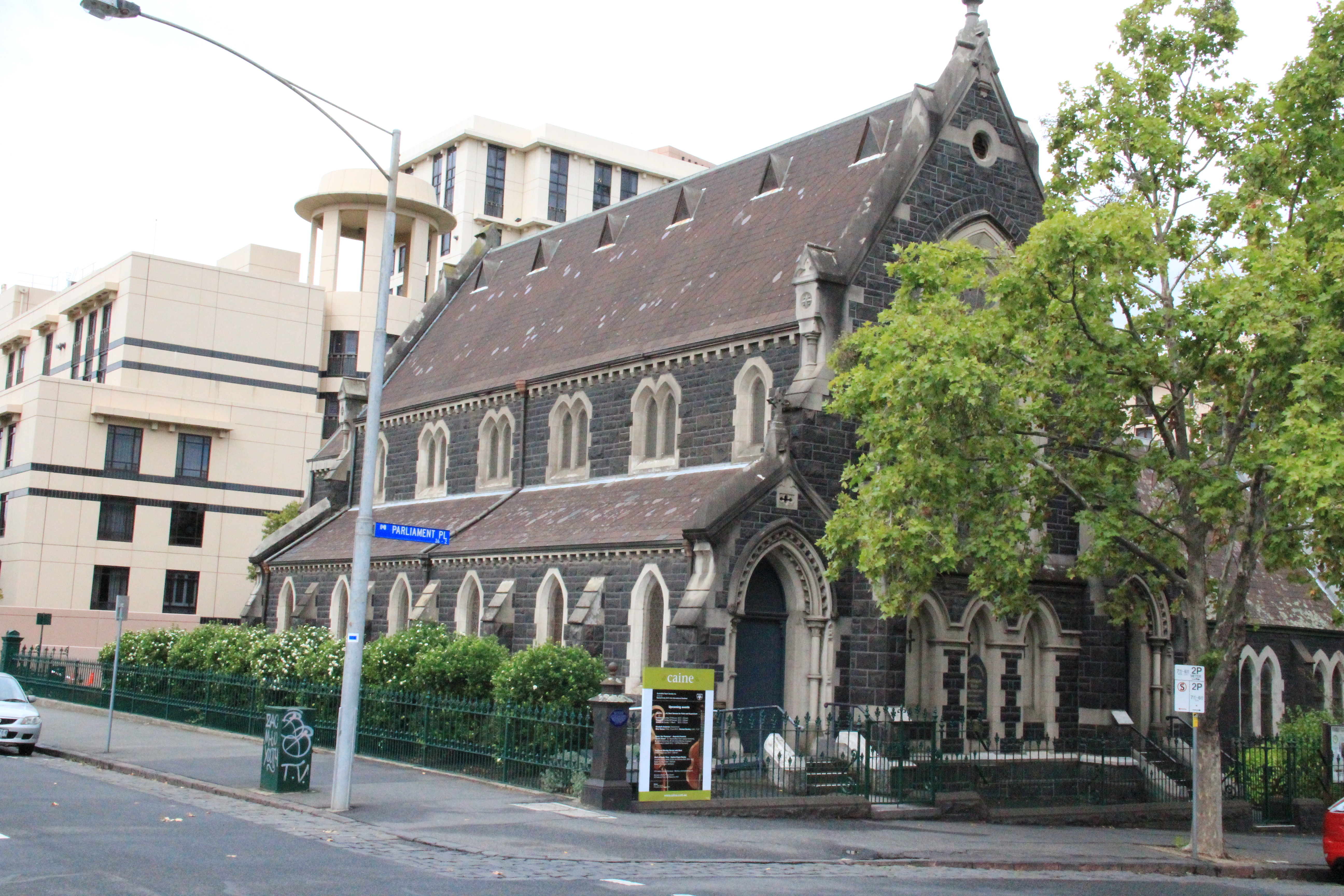 Melbourne